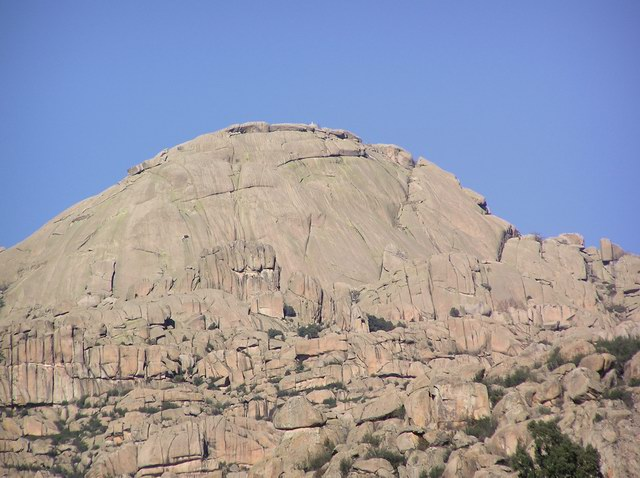 El Yelmo desde Manzanares el Real